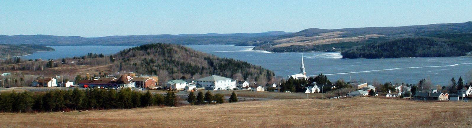 Vue du Lac Témiscouata à la hauteur de Notre-Dame-du-lac, dans le Bas-Saint-Laurent, Québec